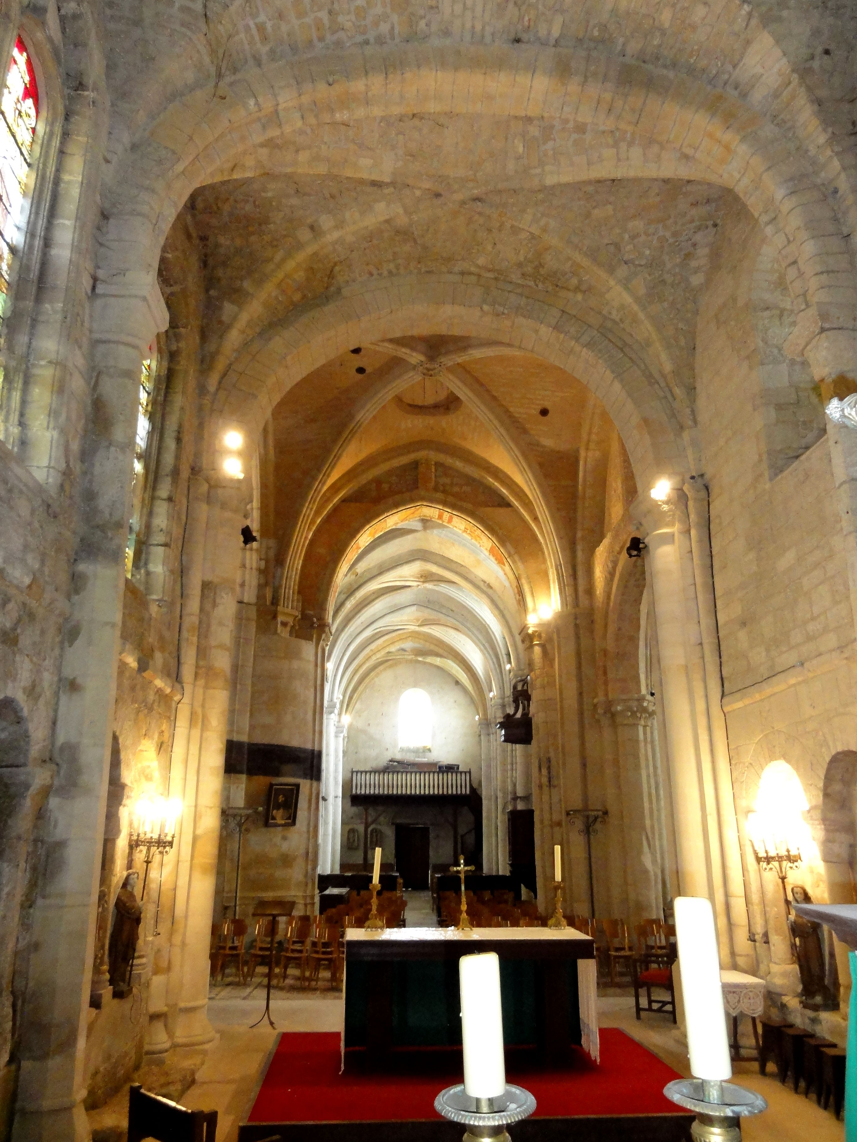 Abside, vue vers l'ouest.